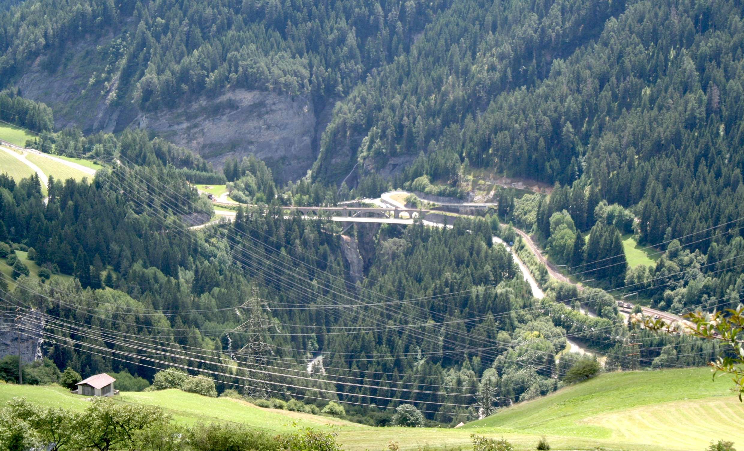 Schinschlucht mit Solis-Viadukt, Blick Richtung S